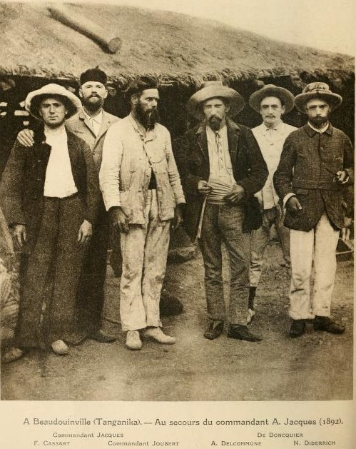 Expeditieleden AIA in Boudewijnstad (Moba in Congo) 1892